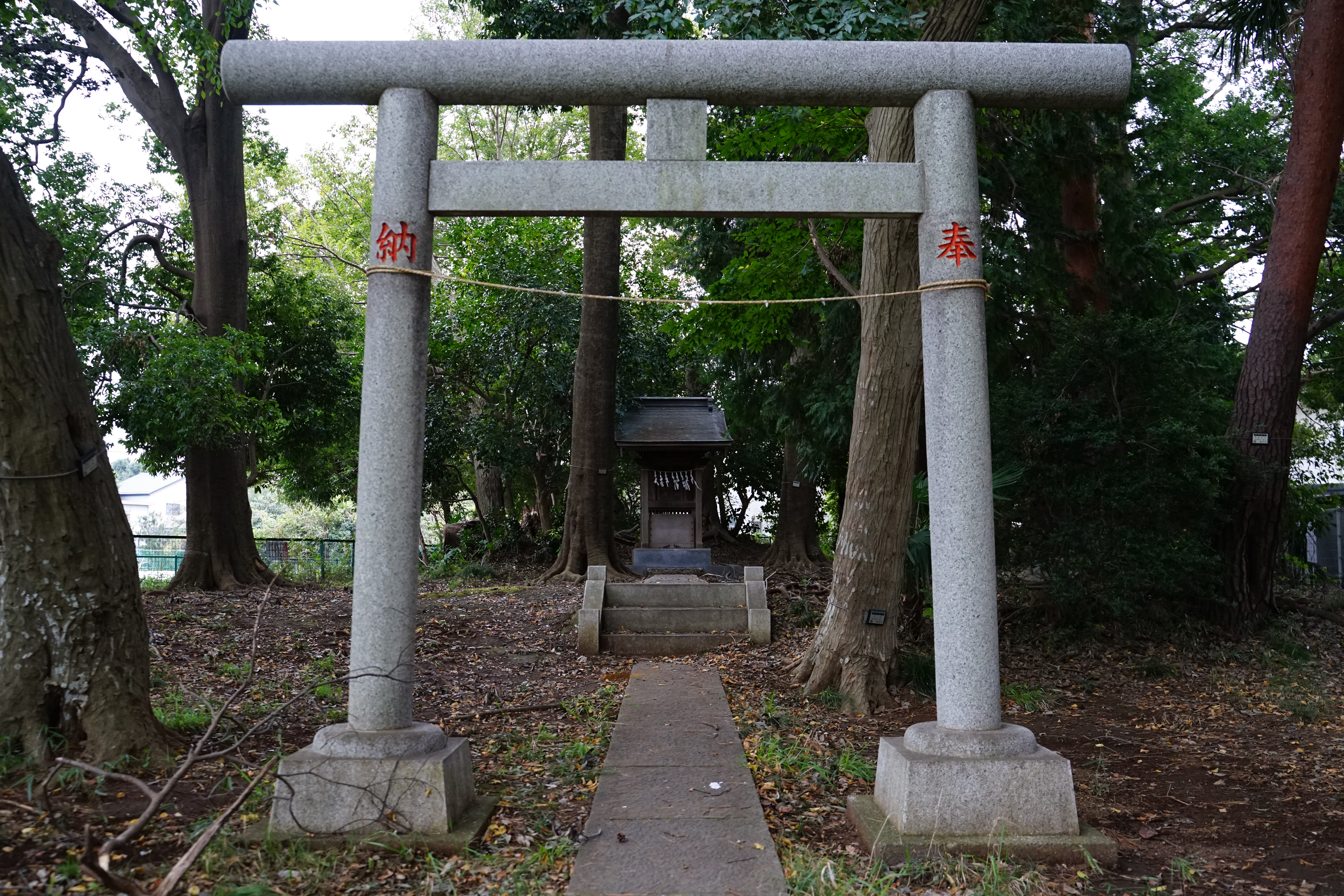 東京都調布市 佐須神明宮の鳥居